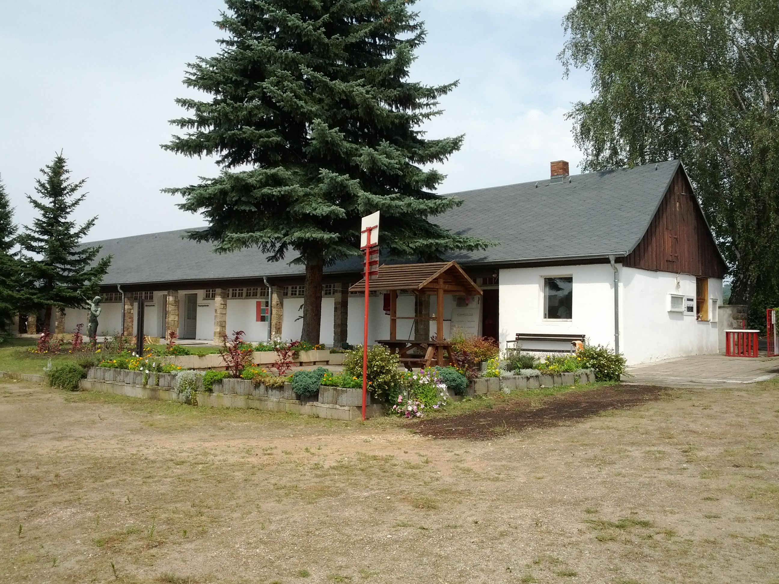 Lößnitzbad; Eingangsgebäude und Umkleiden